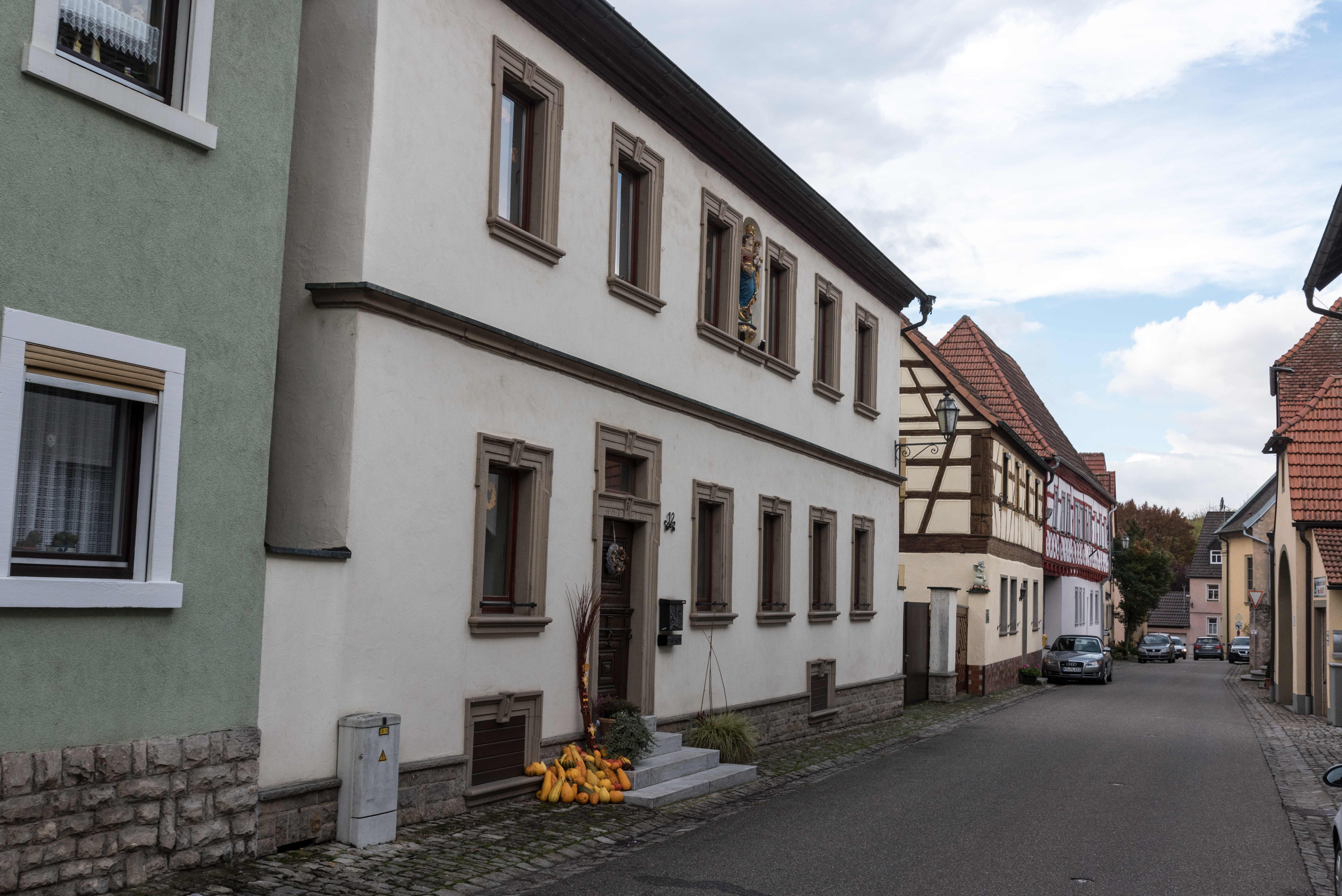 Volkach, Fahr, Blütenstraße 10, 8, 6